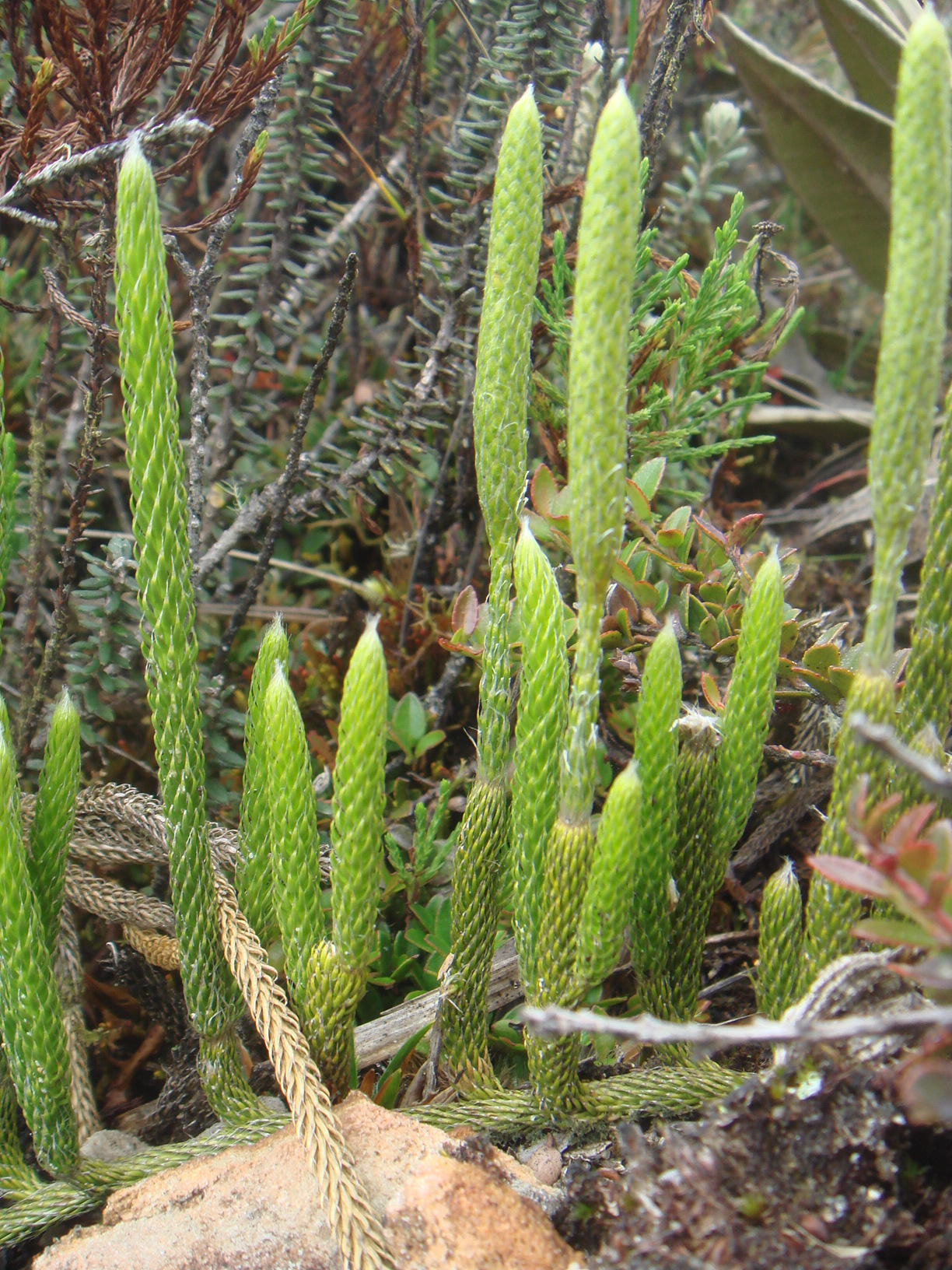 Caminera (Lycopodium clavatum) (=wrong id) en el Páramo de Guasca, Colombia